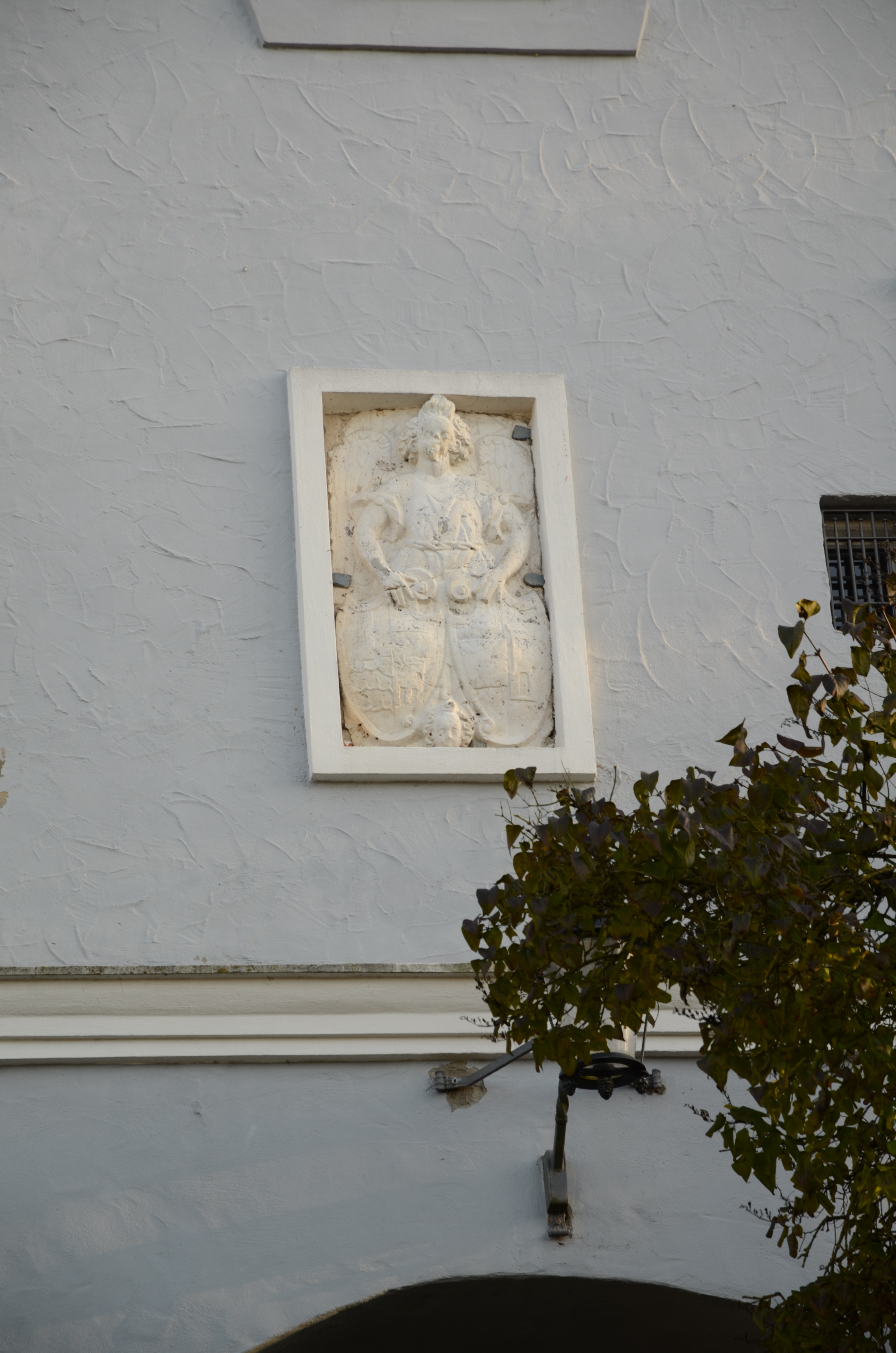 Günzburg, Zum Kuhturm 3, Wappenrelief von 1617, Schildhalter: Engel, optisch links: Markgraf Karl von Burgau, optisch rechts: Stadtwappen Burgau